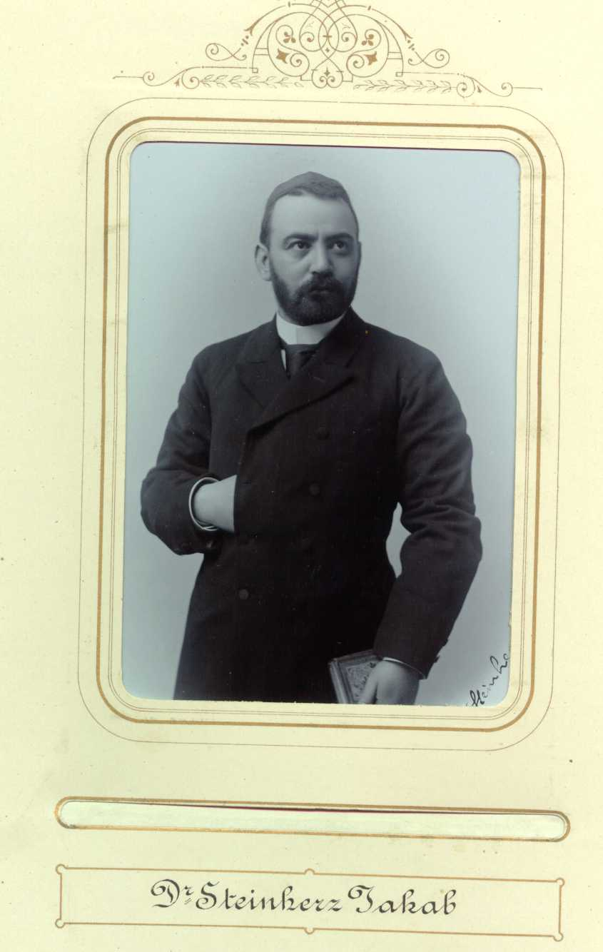 Steinherz Jakab, a Rabbiképzős tablóján